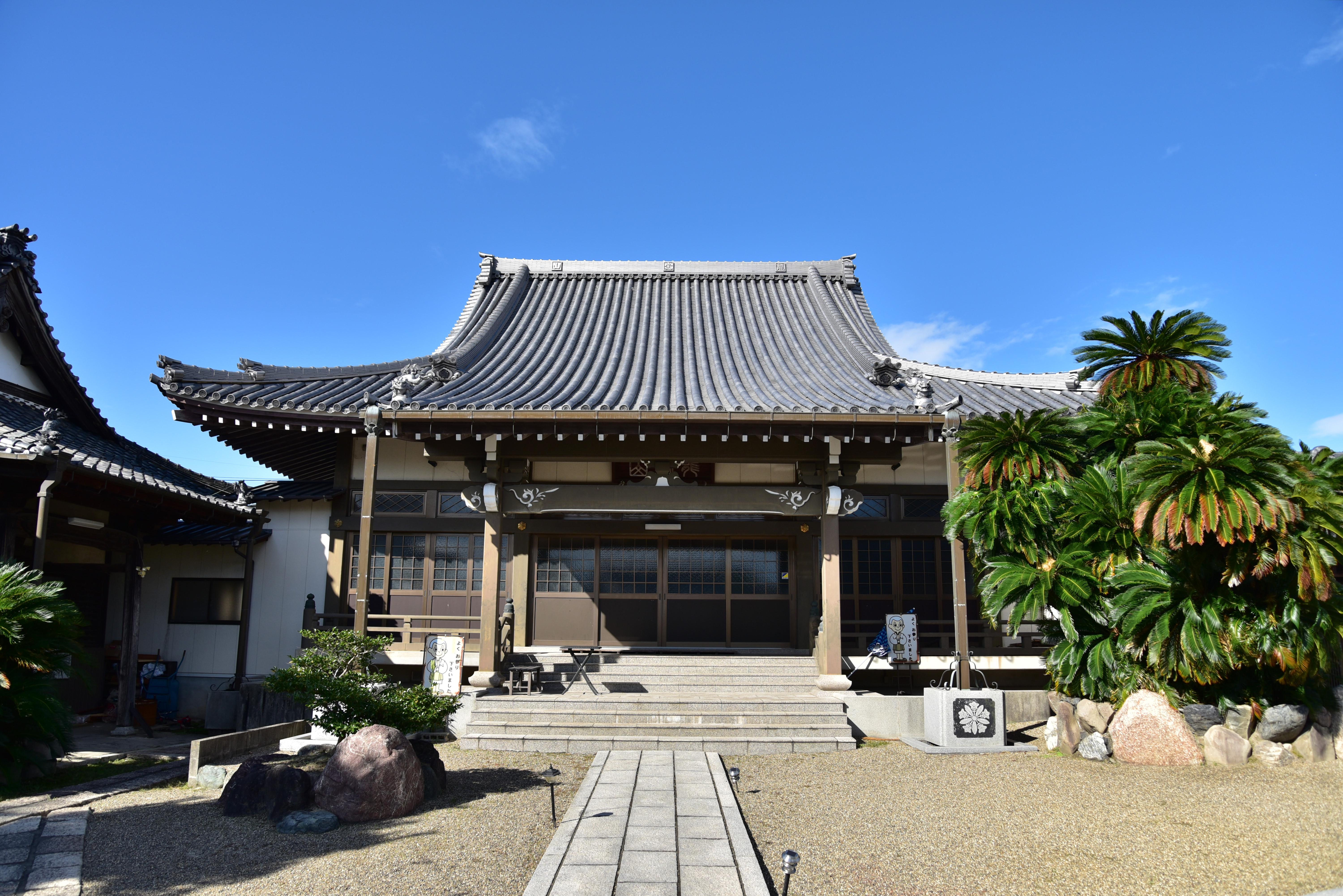 服部一忠の菩提寺である雲居寺 Nikon D750